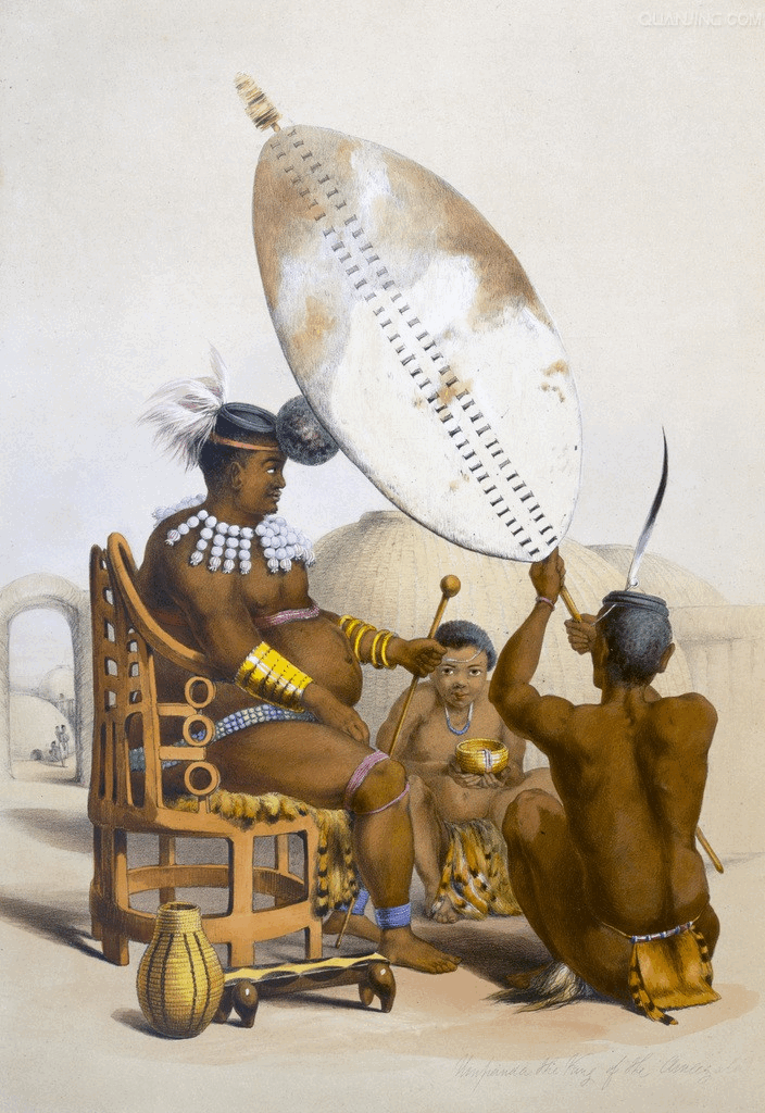 Zulu king Mpande (1798 — 1872)